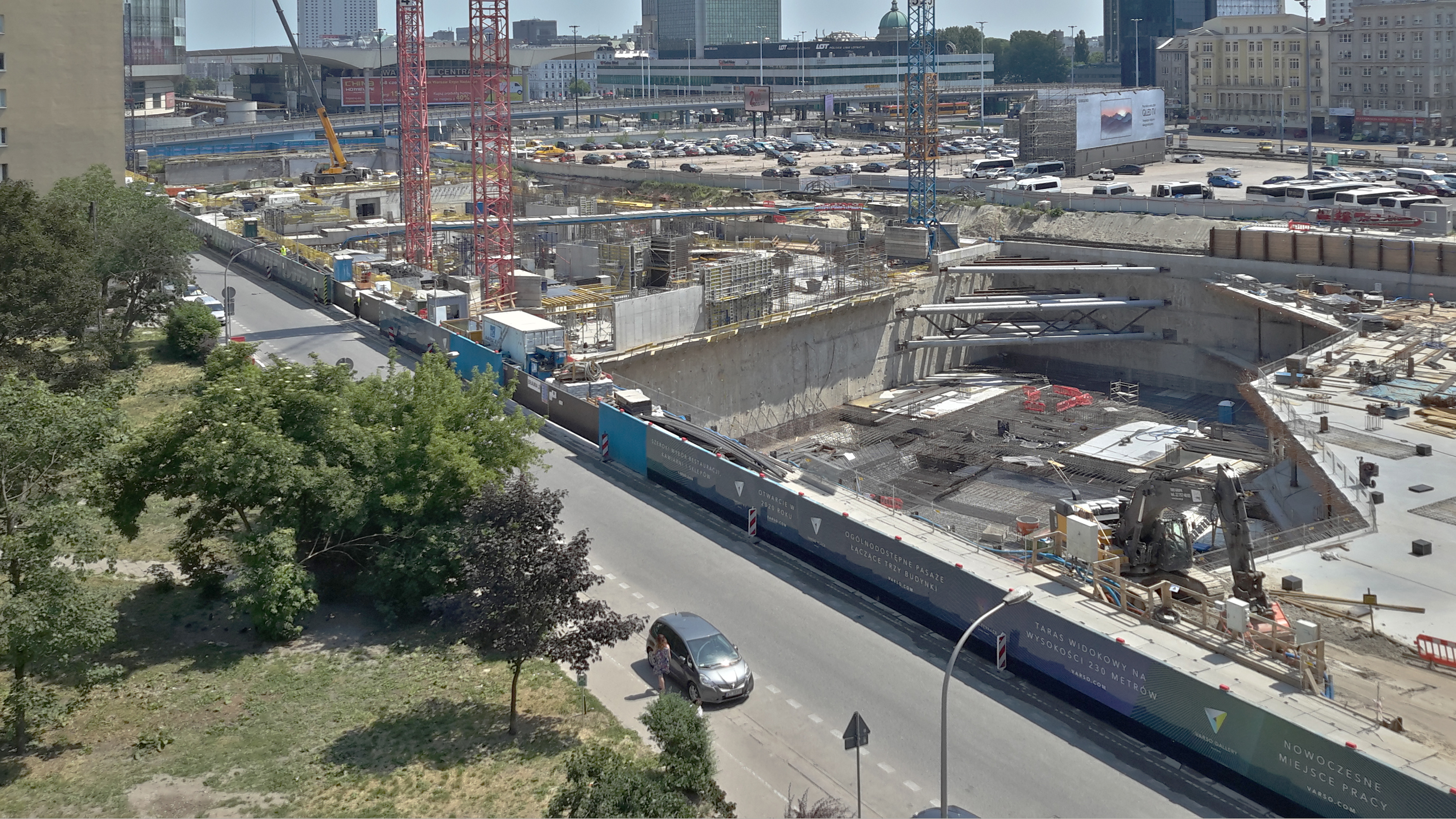 plac budowy Varso 1 czerwca 2018